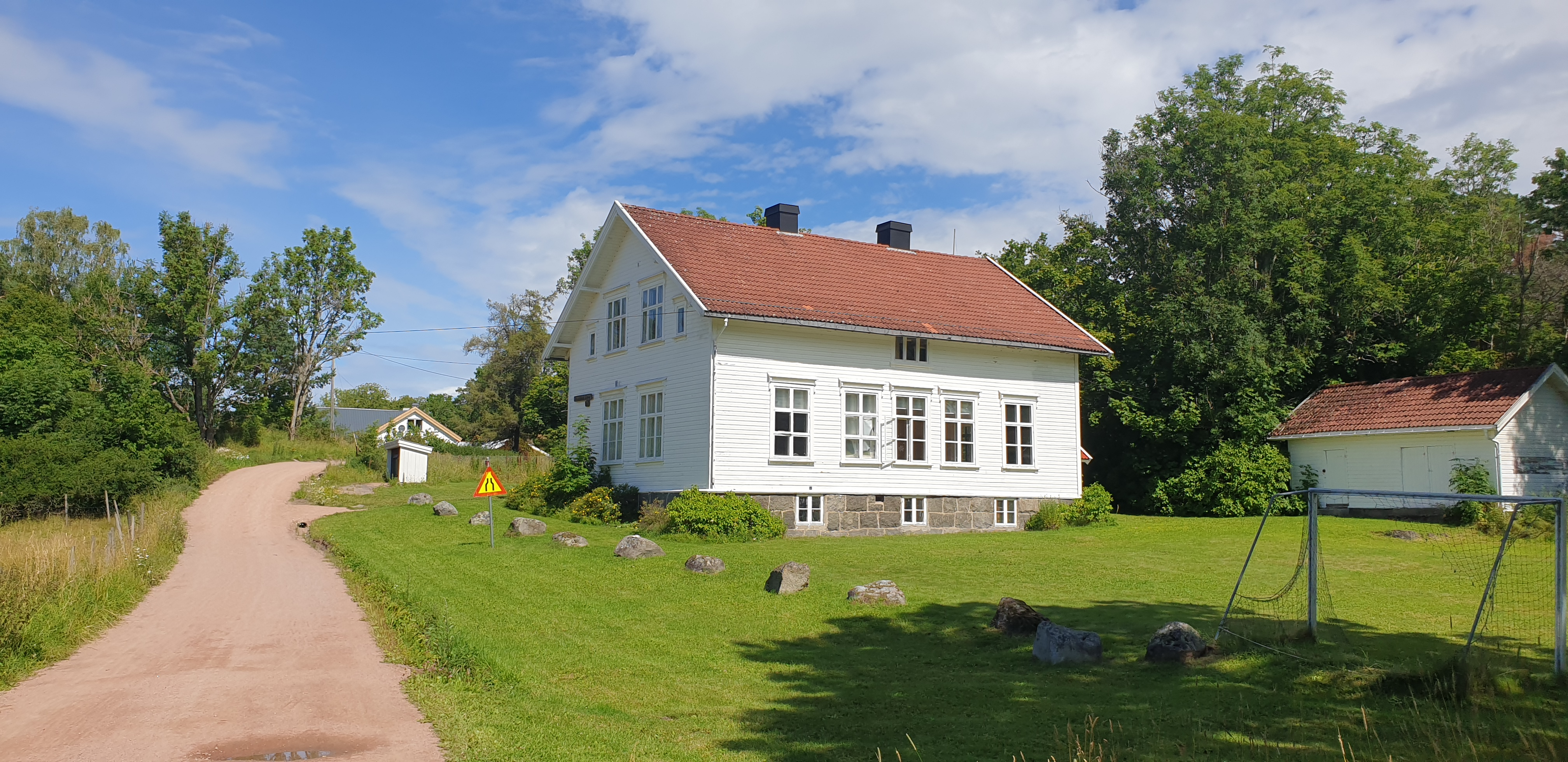 Veierland skole, Færder kommune